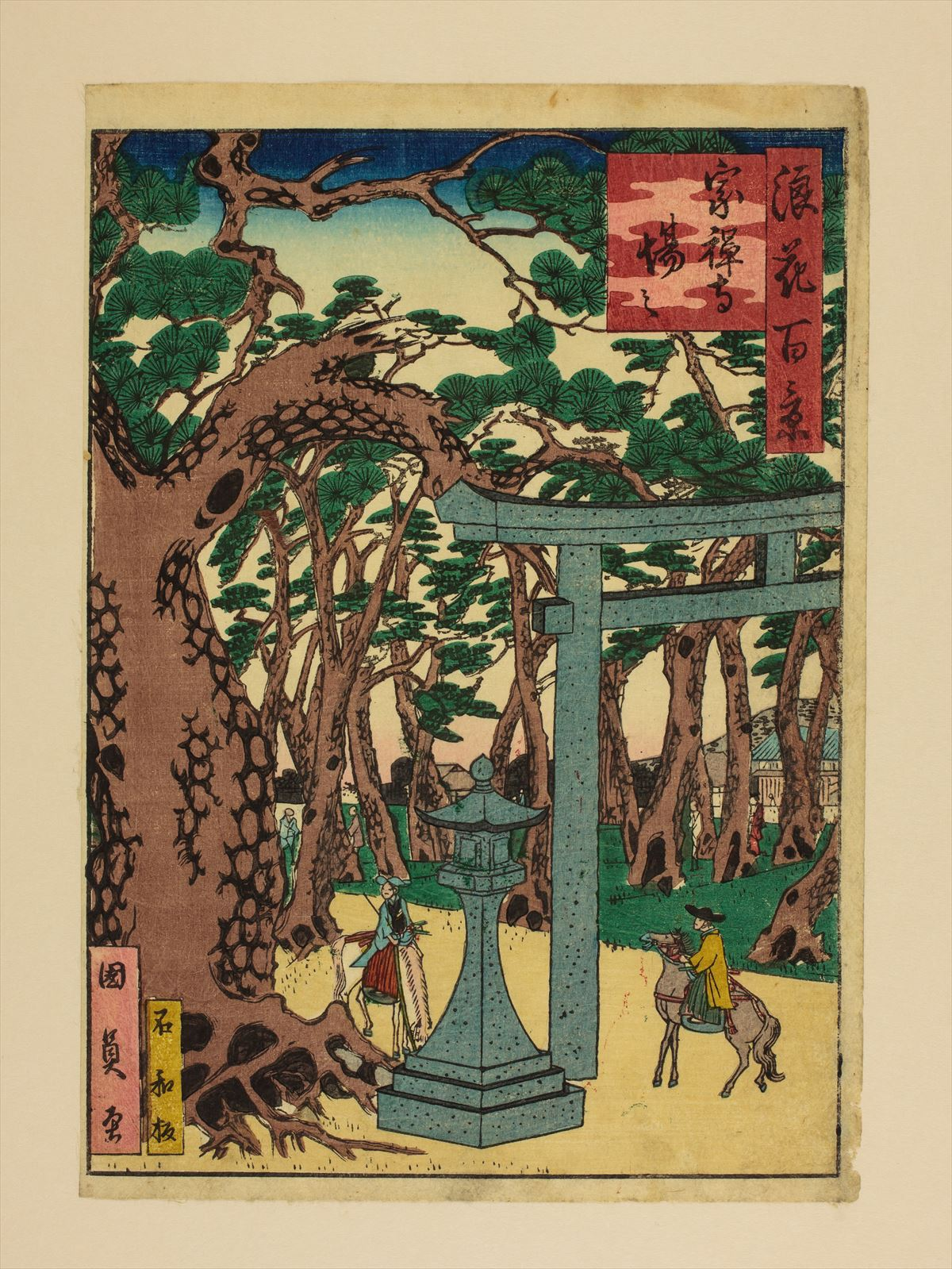 1800年代。歌川國員/画。浪花百景 102枚のうちの1枚。大阪市立中央図書館蔵。